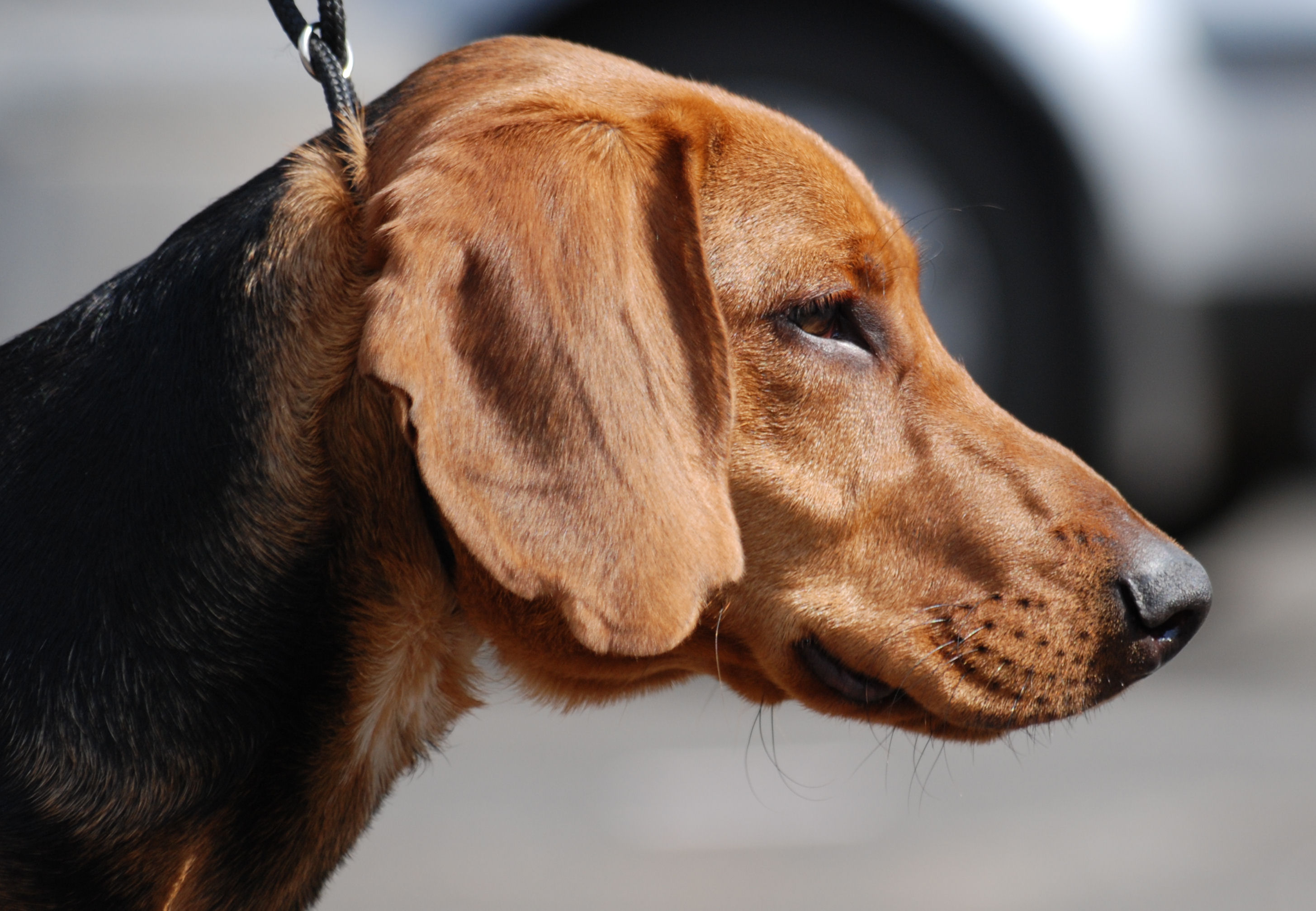 Schiller Hound (Gończy Schillera) Międzynarodowa Wystawa Psów Rasowych w Katowicach 28 - 30. 03.2008